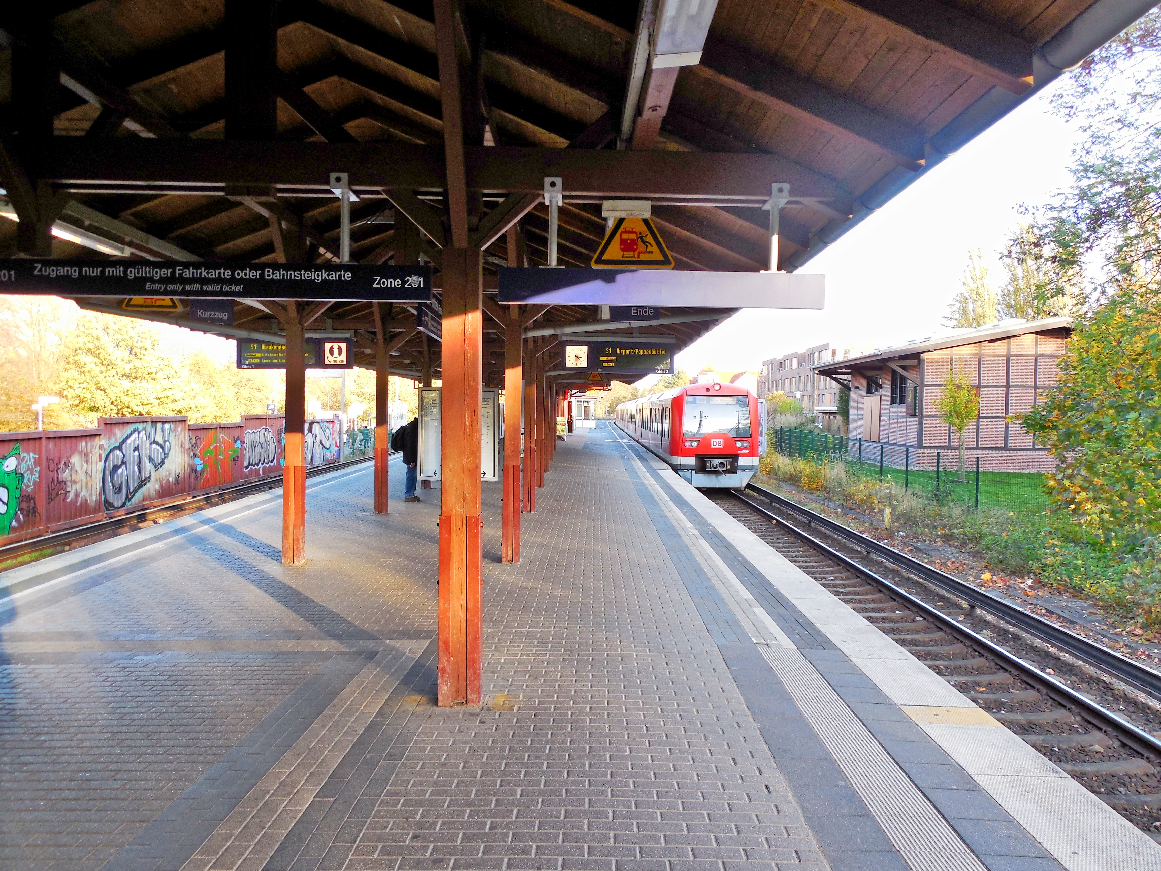 Bahnsteig